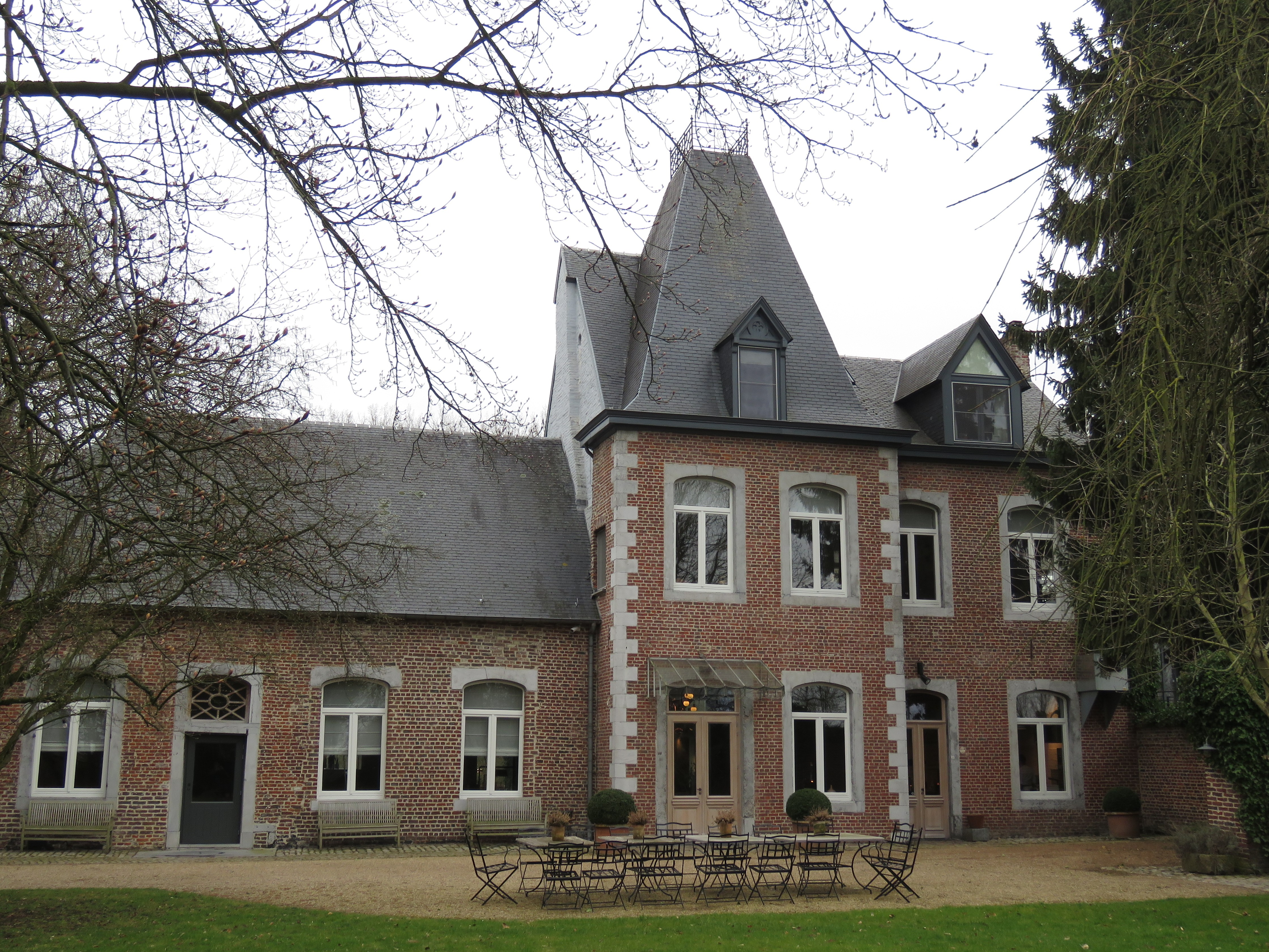 Kasteel Melveren (Sint-Truiden)